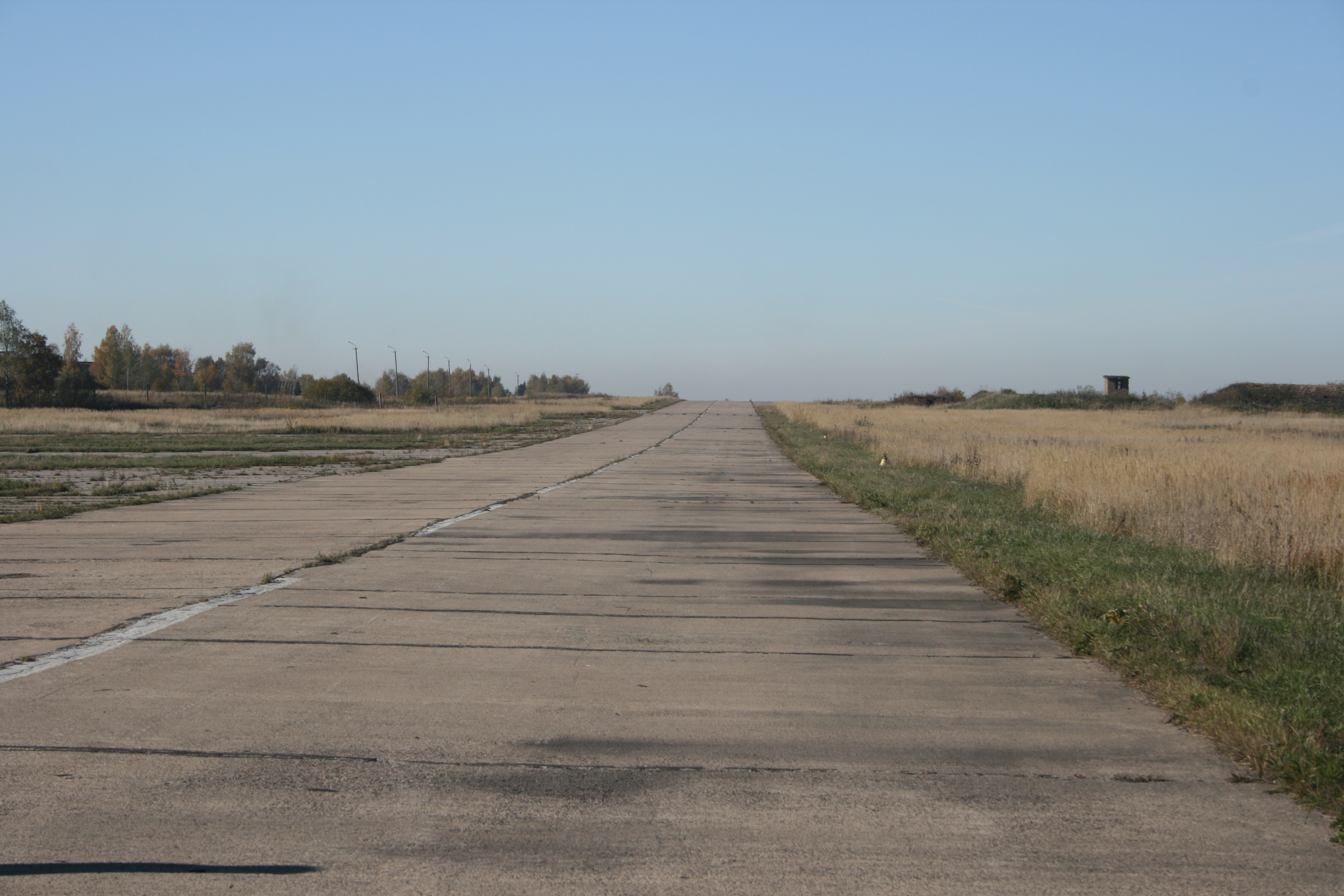 Droga kołowania lotniska Seviernyj w Smoleńsku